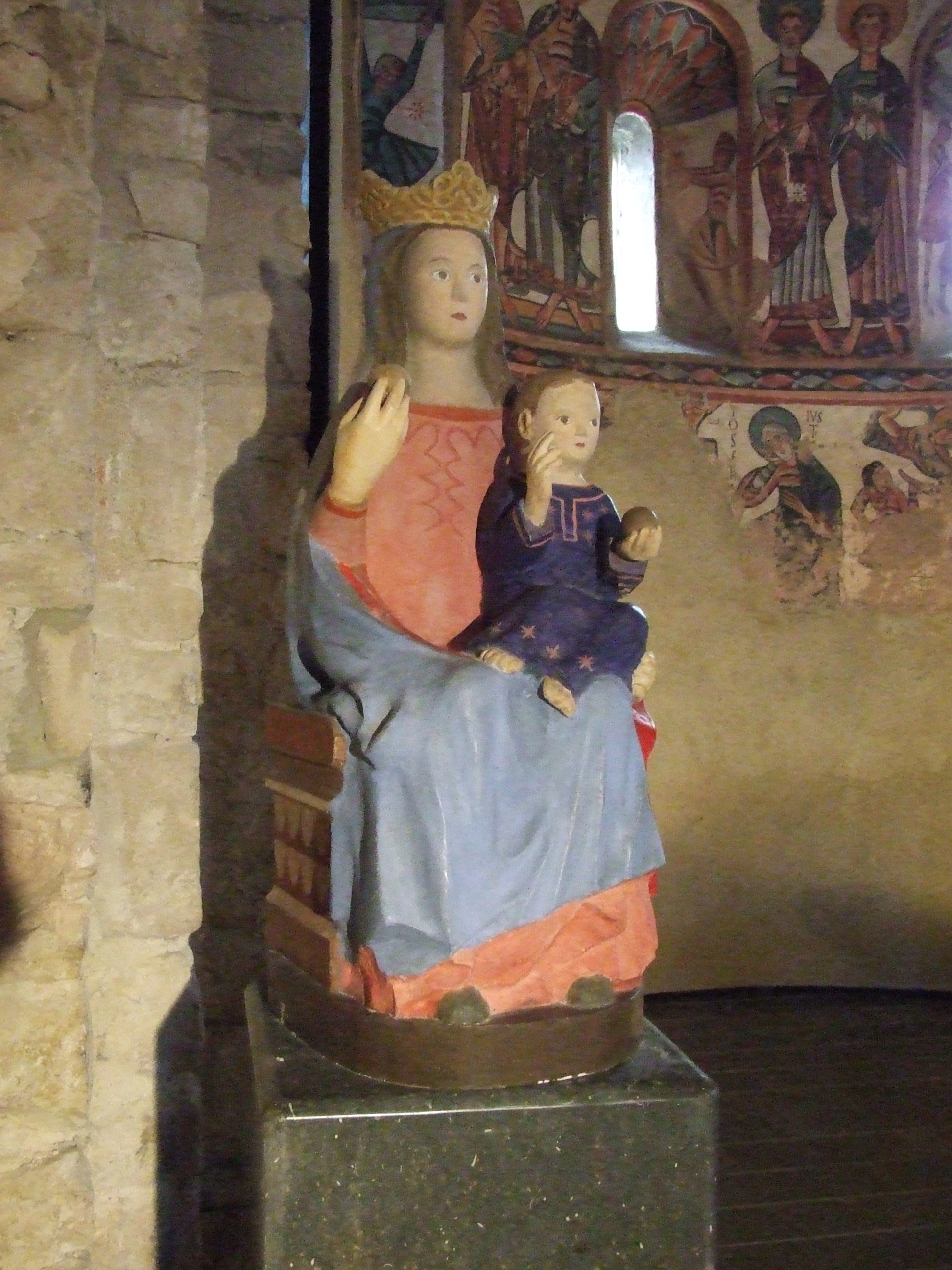 La Mare de Déu de Mur, reconstruïda (Castell de Mur, Pallars Jussà)